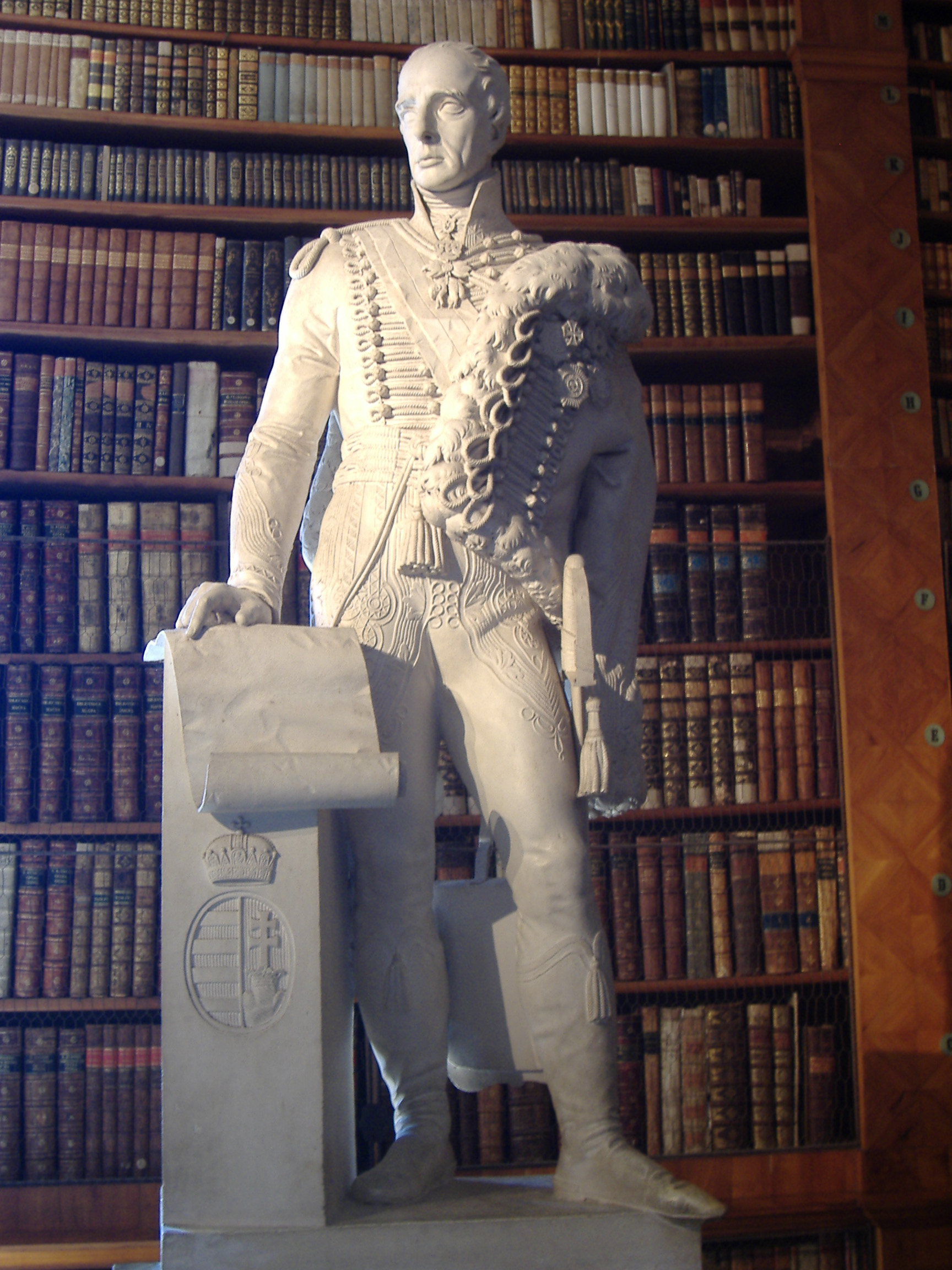 I. Ferenc magyar király (Habsburg-Toscanai Ferenc József Károly osztrák főherceg) szobra a Pannonhalmi Bencés Főapátságban. Josef Klieber osztrák szobrász munkája